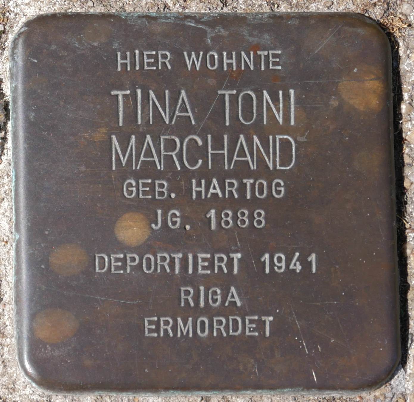 Stolpersteine Wesel: Marchand, Tina Toni